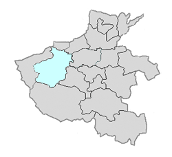 河南洛阳